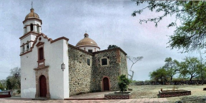 Este templo se alcanza a apreciar desde la plaza principal y desde el templo de la cruz se puede disfrutar de una vista panorámica de la ciudad.